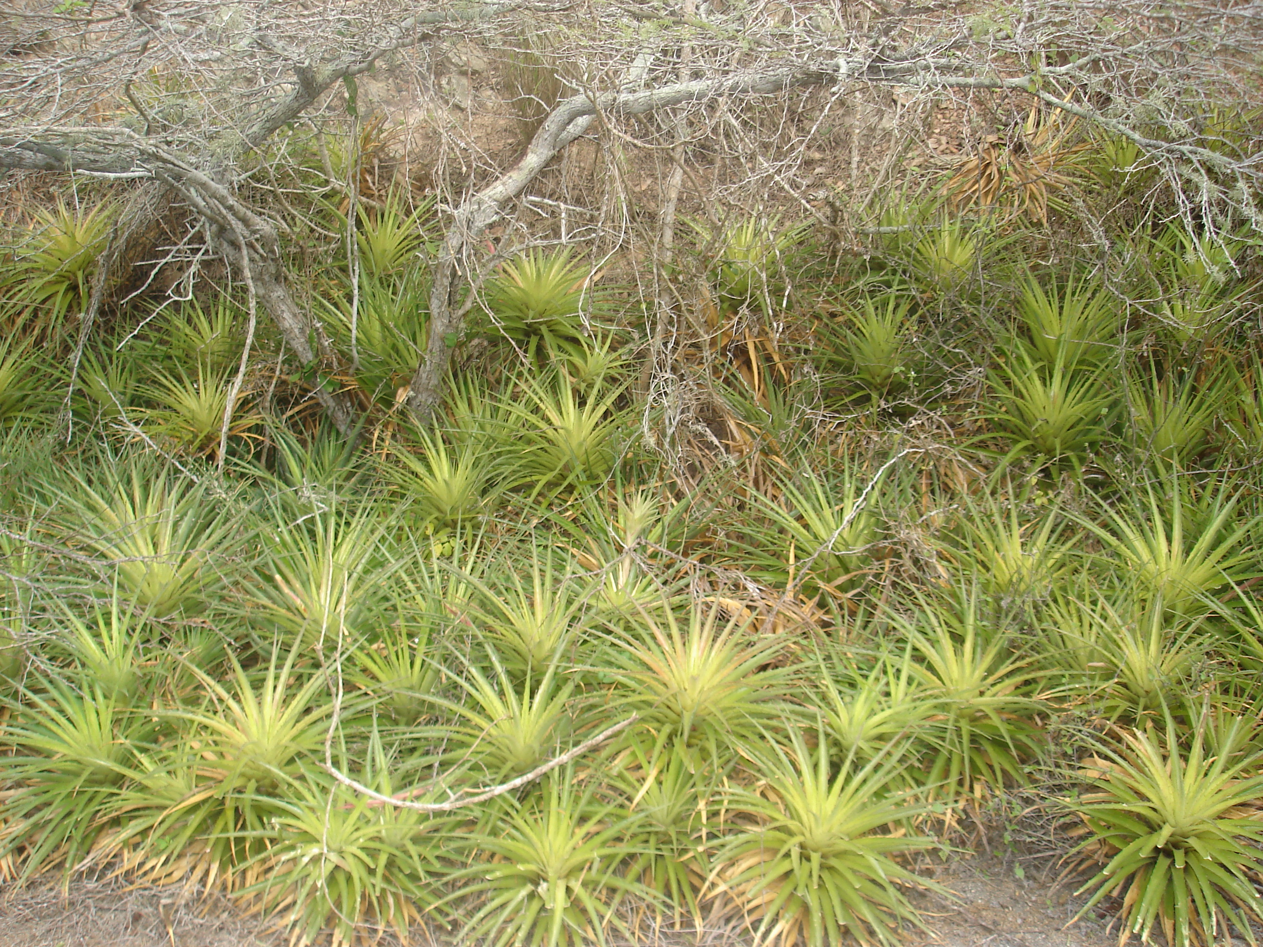 Flora de San José de Cocodite